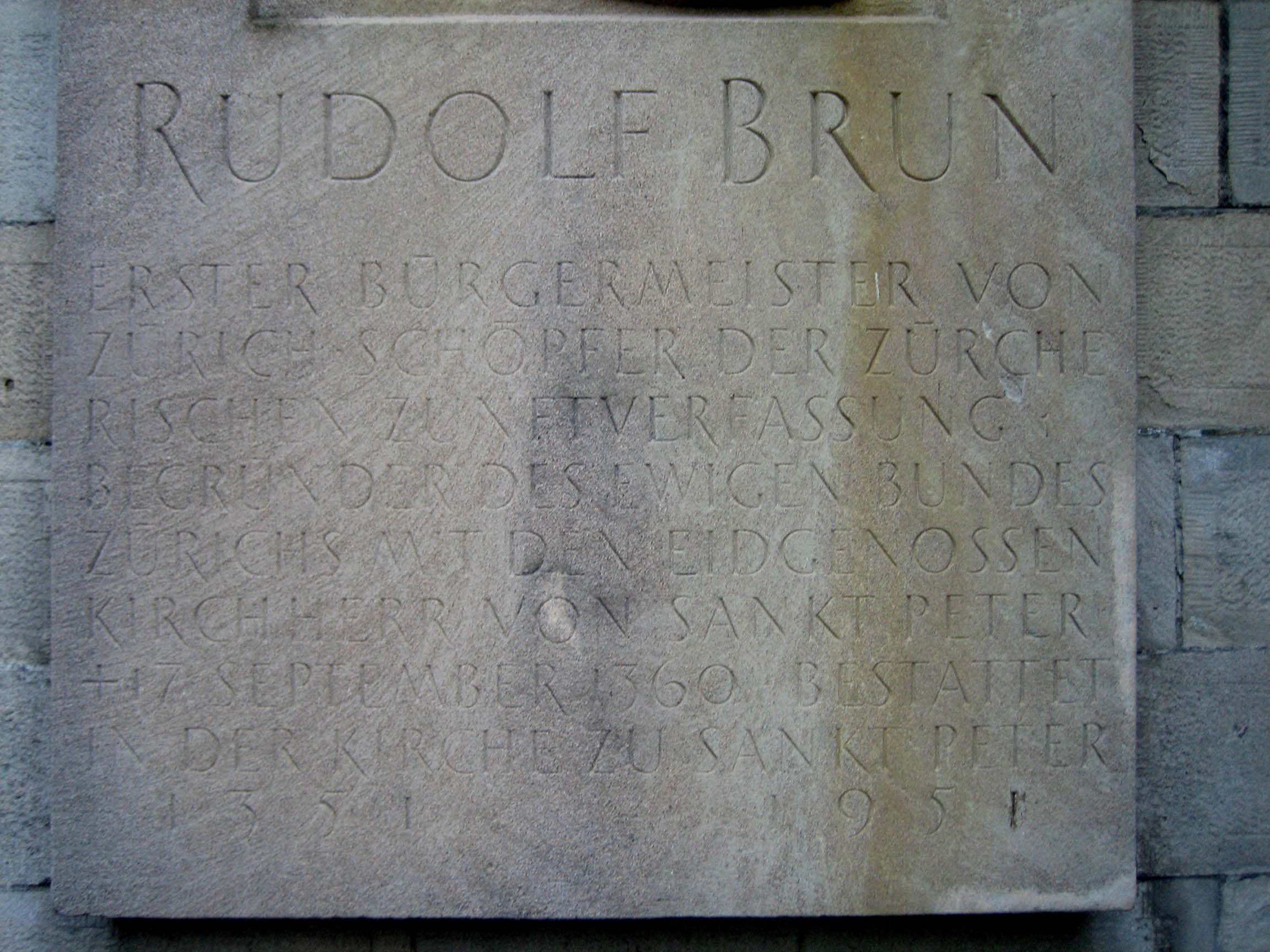 Inschrift auf dem Gedenkstein.